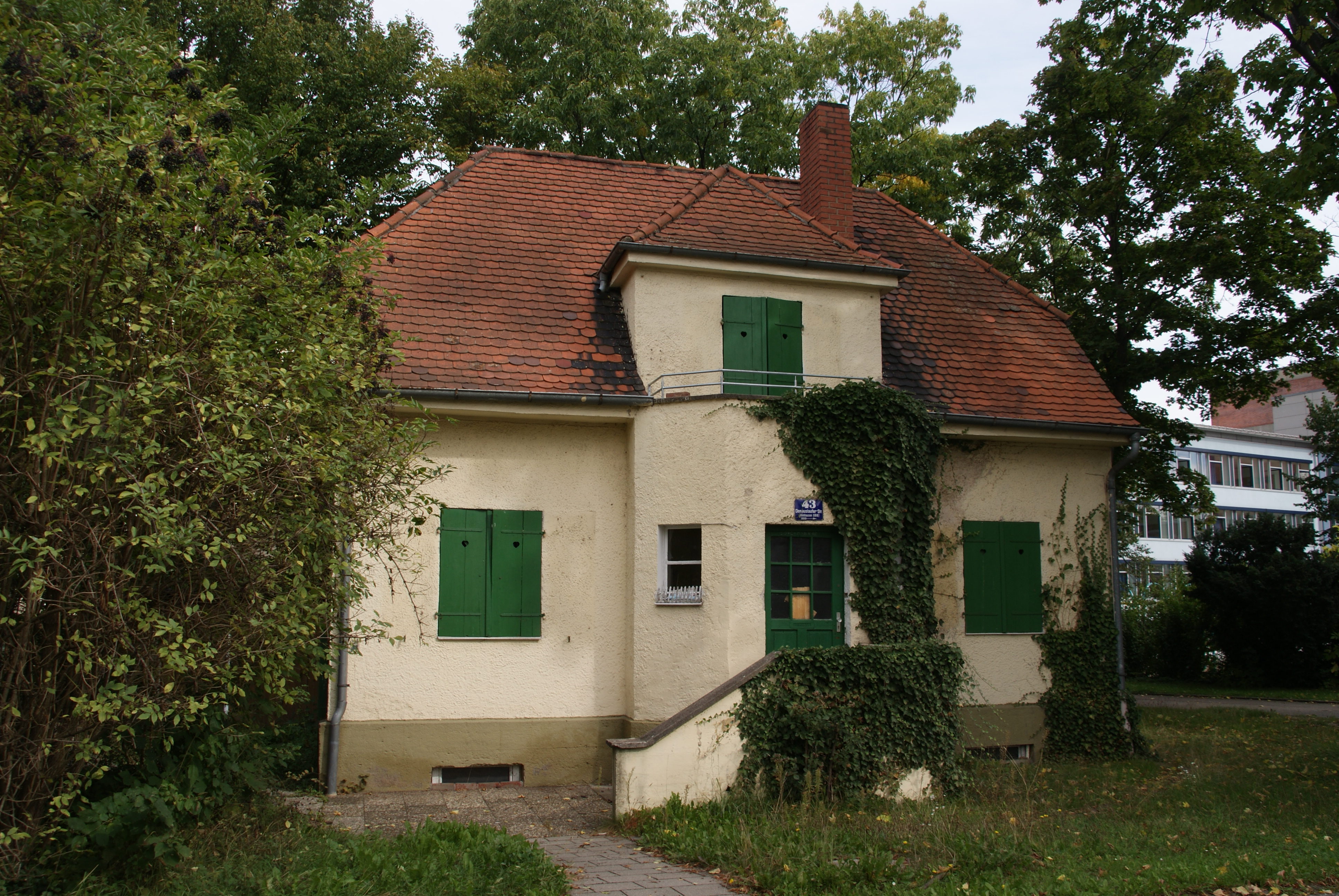 Ehemaliges Betriebsgebäude der Walhallabahn an der Donaustaufer Straße in Regensburg. Das Gebäude wurde wegen Befalls mit schwarzem Schwamm mittlerweile abgerissen.